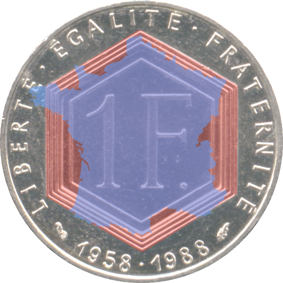 l'Hexagone